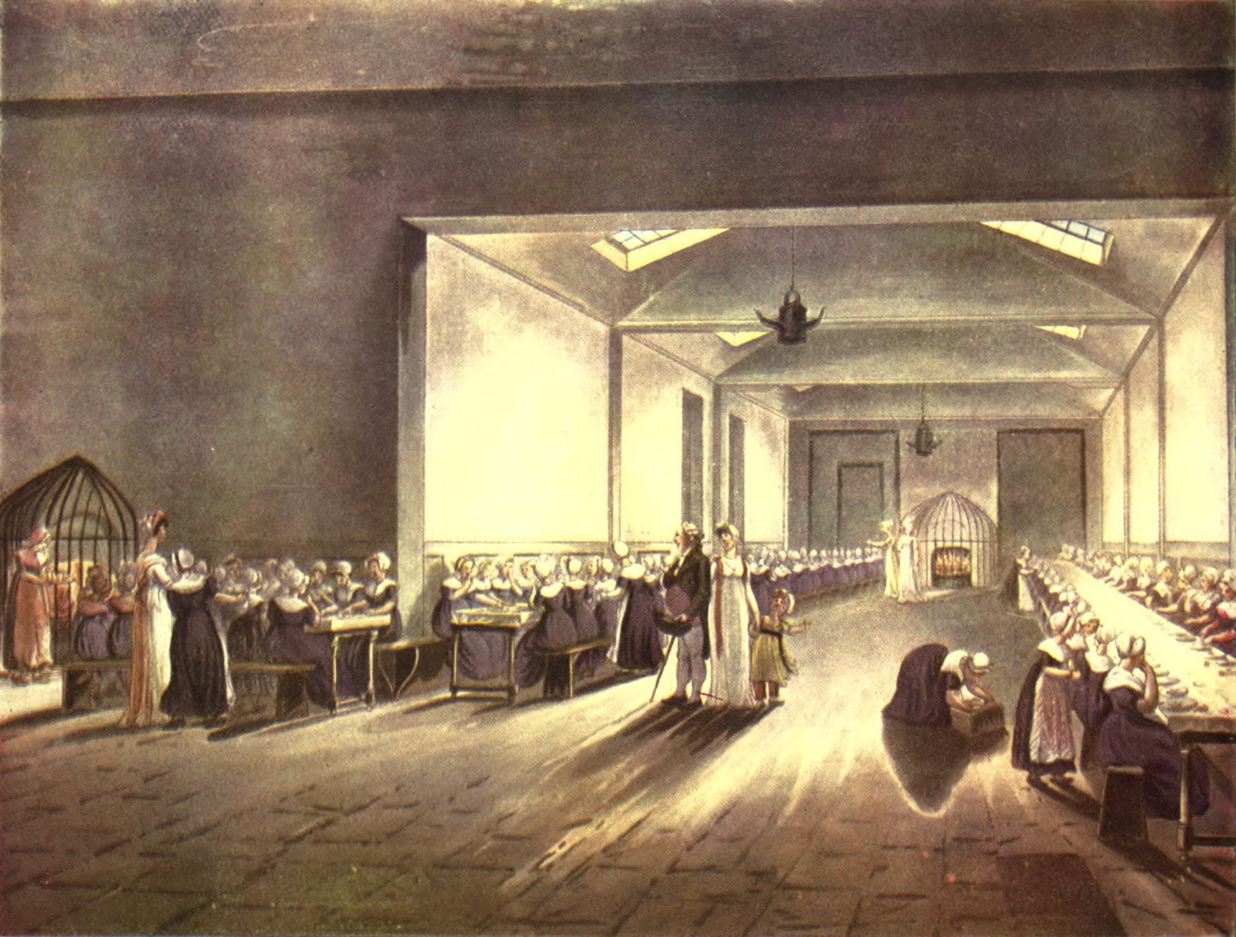 Dining Hall, Asylum